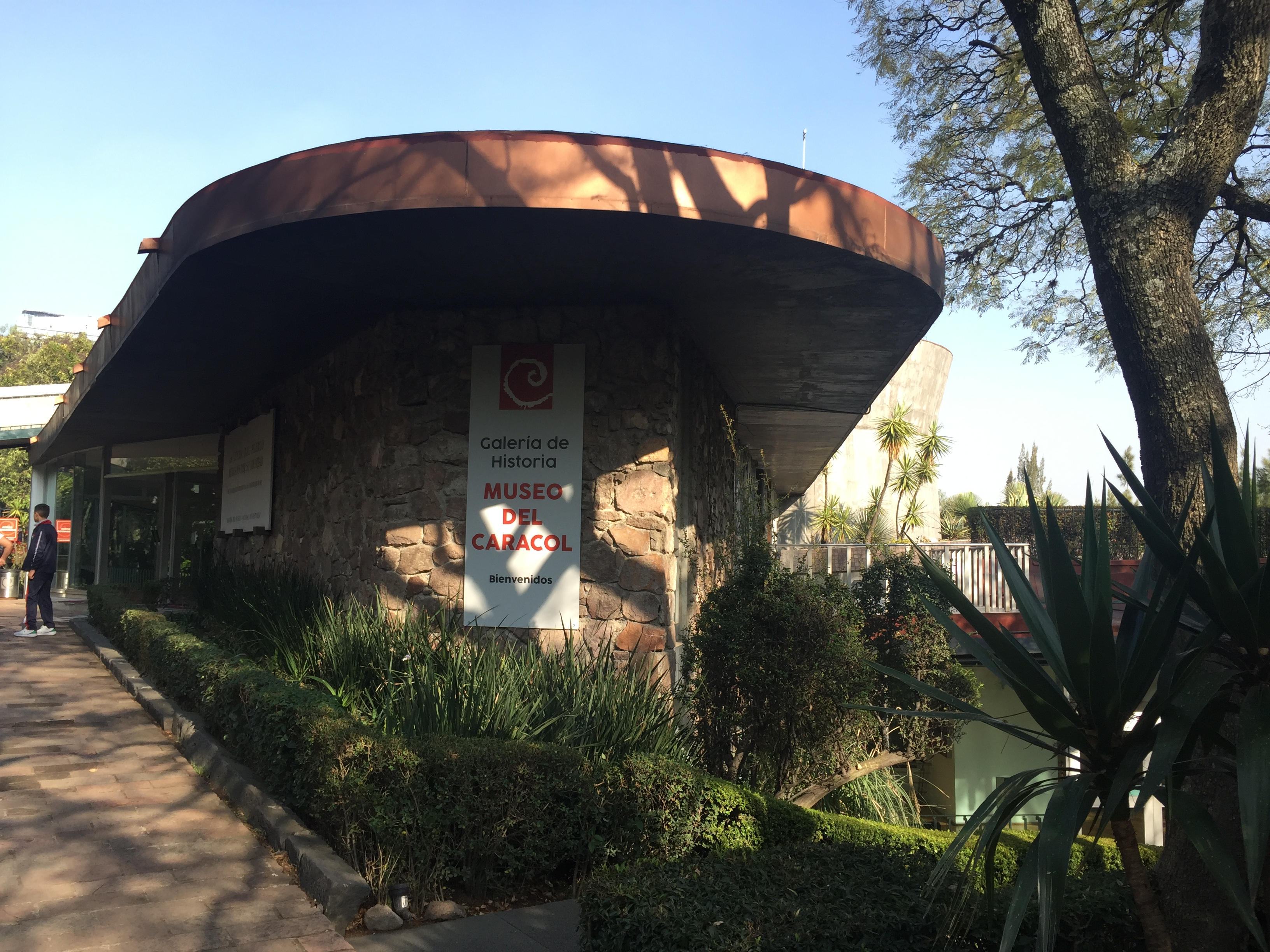 Museo del Caracol, en el Cerro de Chapultepec